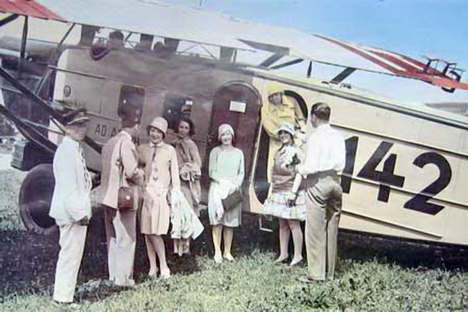 Ad Astra Aero S.A. : Dorner Merkur (CH 142). Cinq passagères débarquent d’un Dornier Merkur de la compagnie suisse Ad Astra Aero (CH-142). Le pilote, tête à l’extérieur, et placé sous l’aile à l’avant (1927)